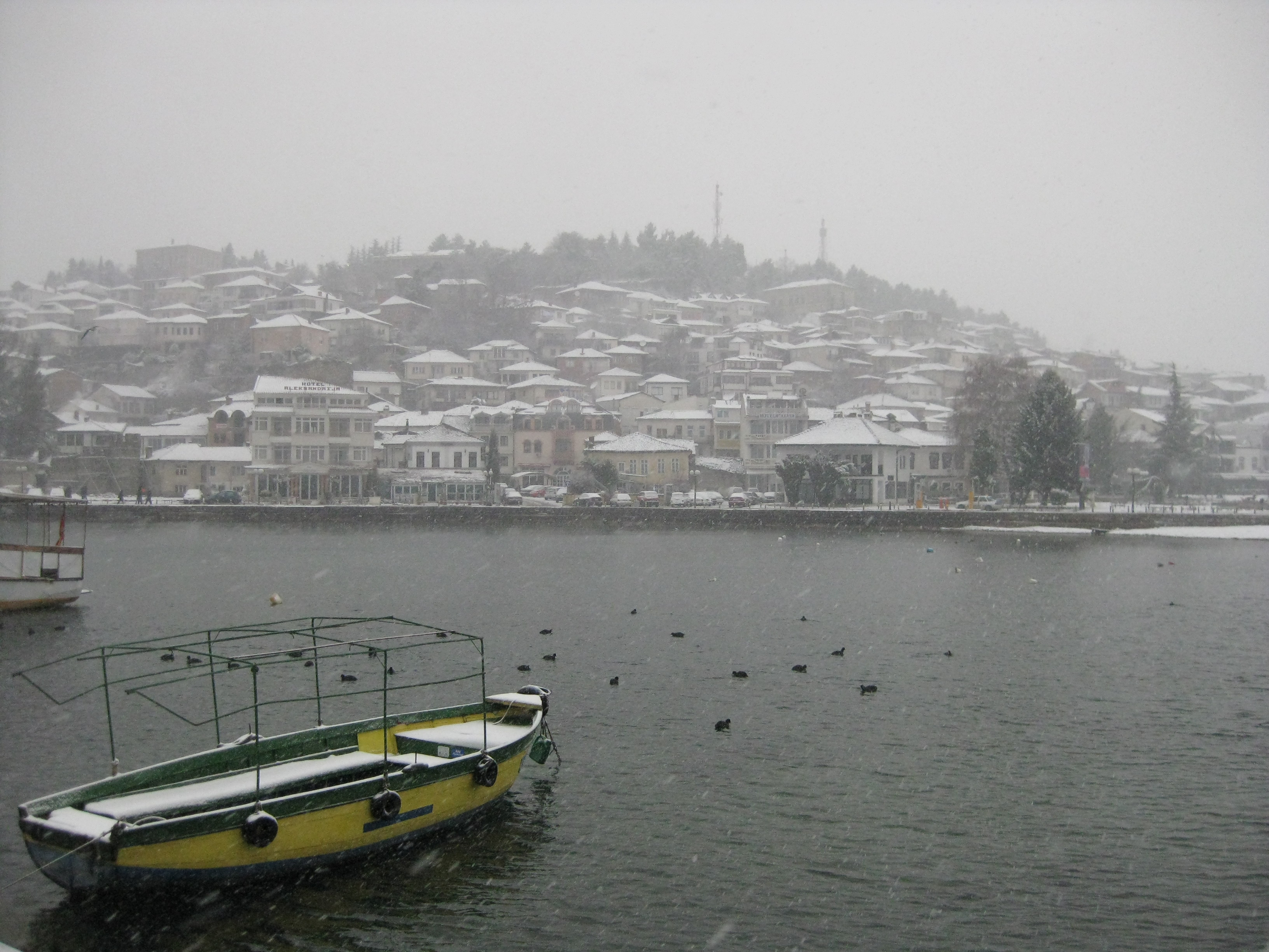 Ohrid, Macedonia